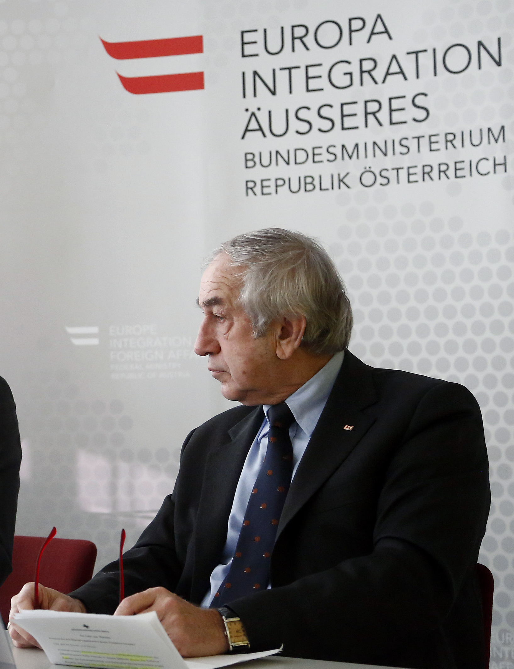 Auftaktveranstaltung Europäisches Jahr für Entwicklung in Österreich v.l.n.r. Peter Launsky, Sebastian Kurz und Gerald Schöpfer. #EYD2015AUT. Katastrophenhilfezentrum Österreichisches Rotes Kreuz, Wien, 26.01.2015, Foto: Dragan Tatic